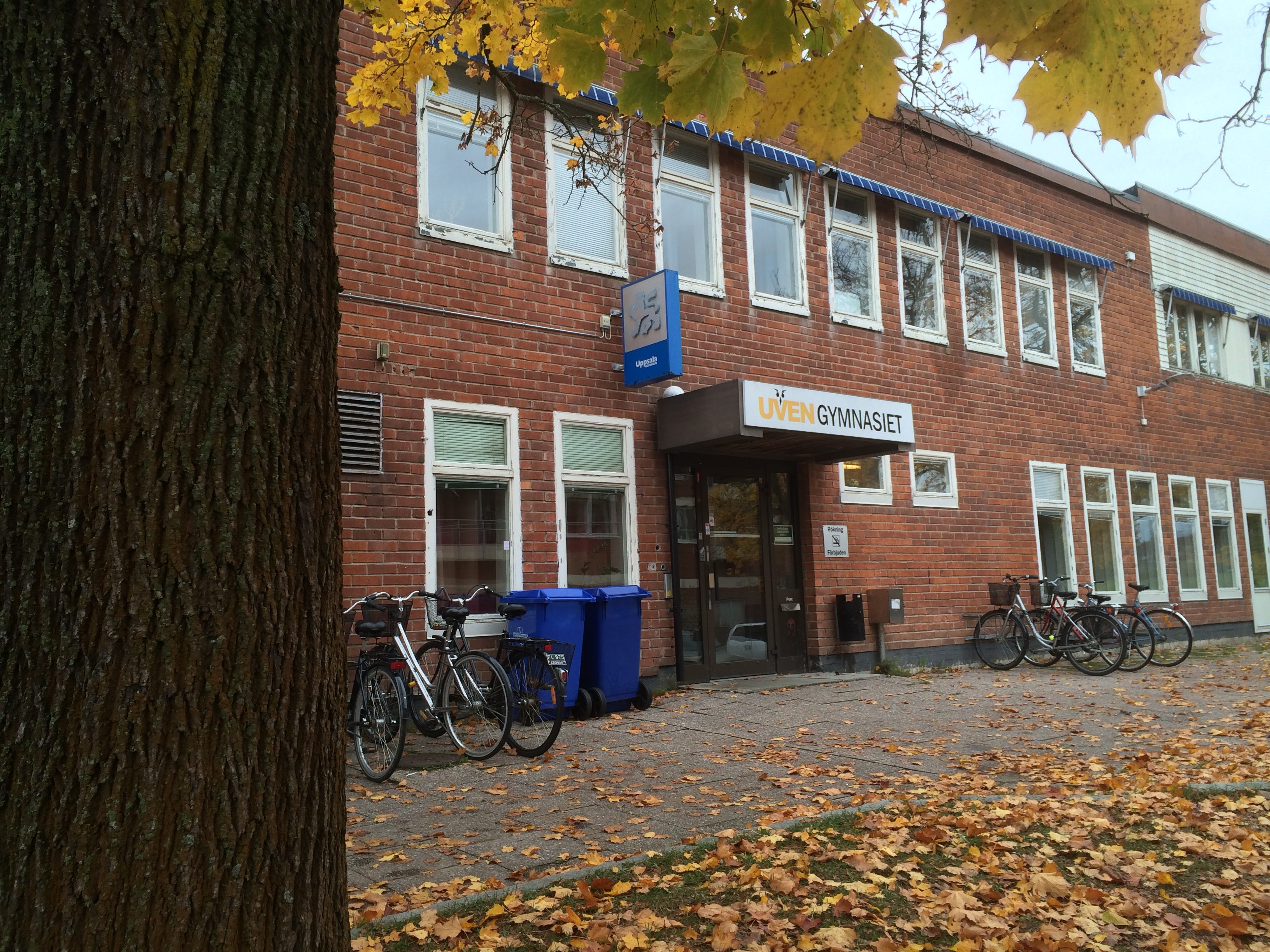 Uvengymnasiet vid Brantingstorg i Uppsala